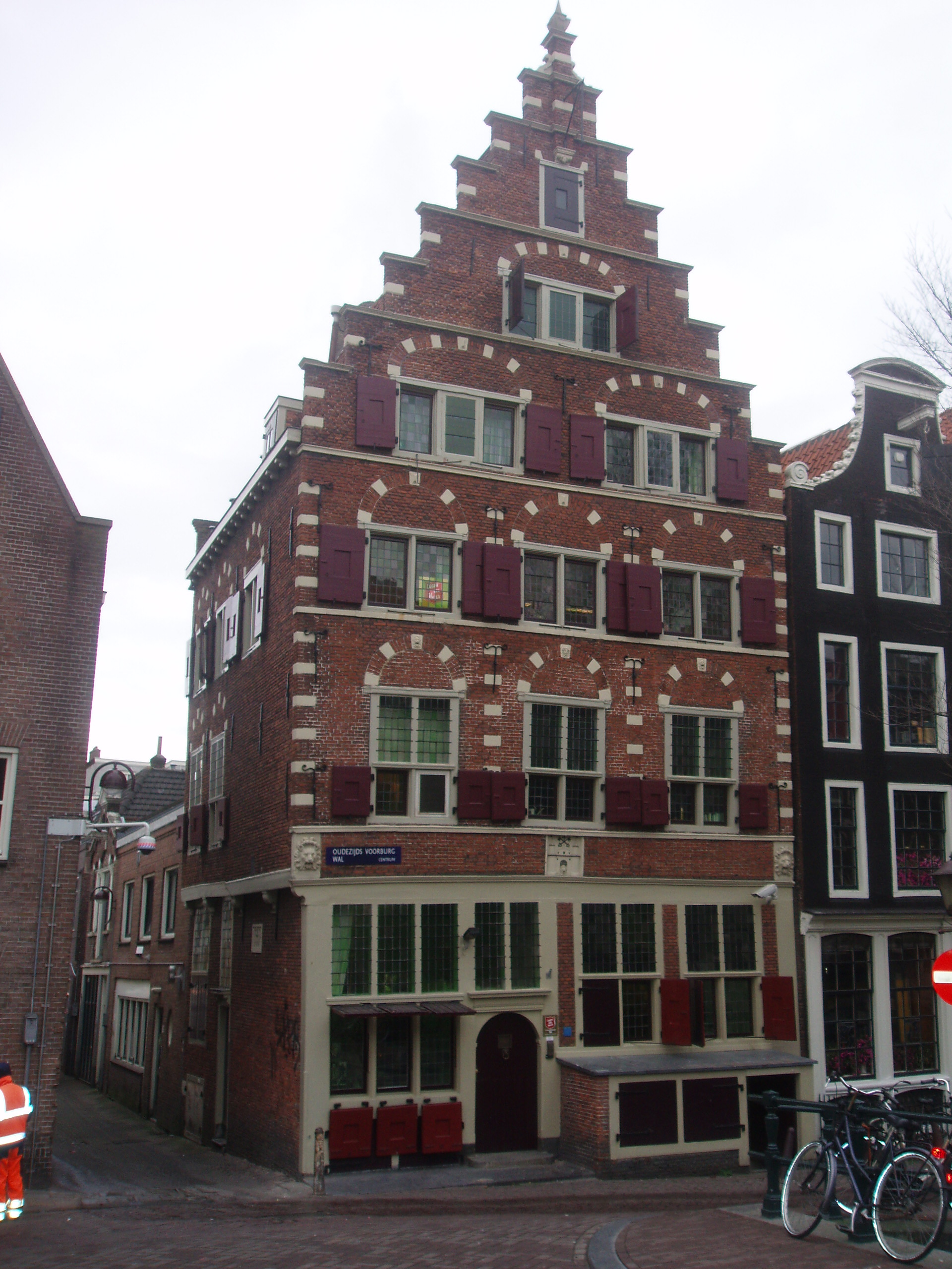 Dit is een foto van Oudezijds Voorburgwal 14, ook wel Wapen van Riga, Leeuwenburg of Burcht van Leiden genoemd.